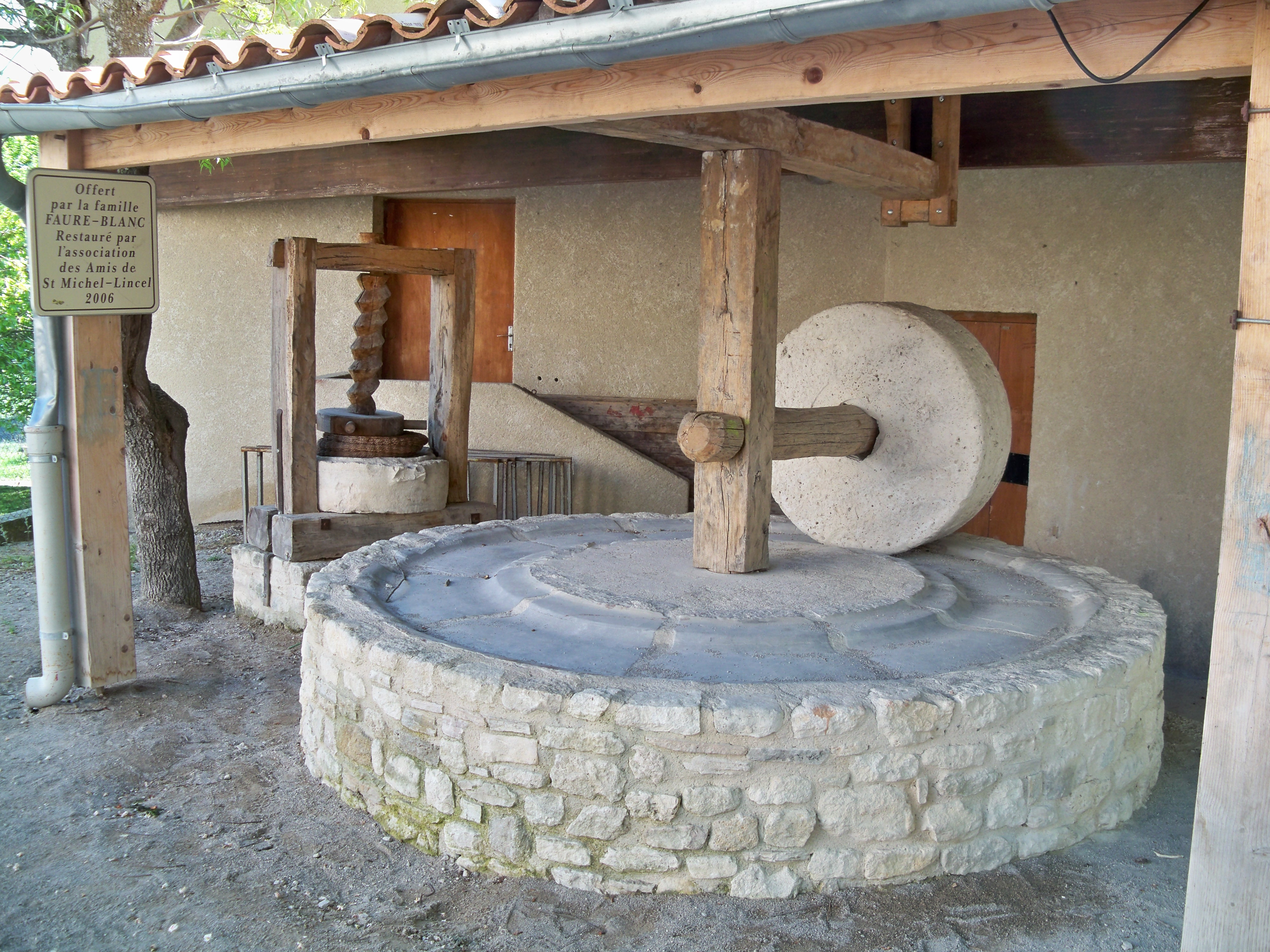 Meule de moulin à huile à Saint Michel l'Observatoire (04)